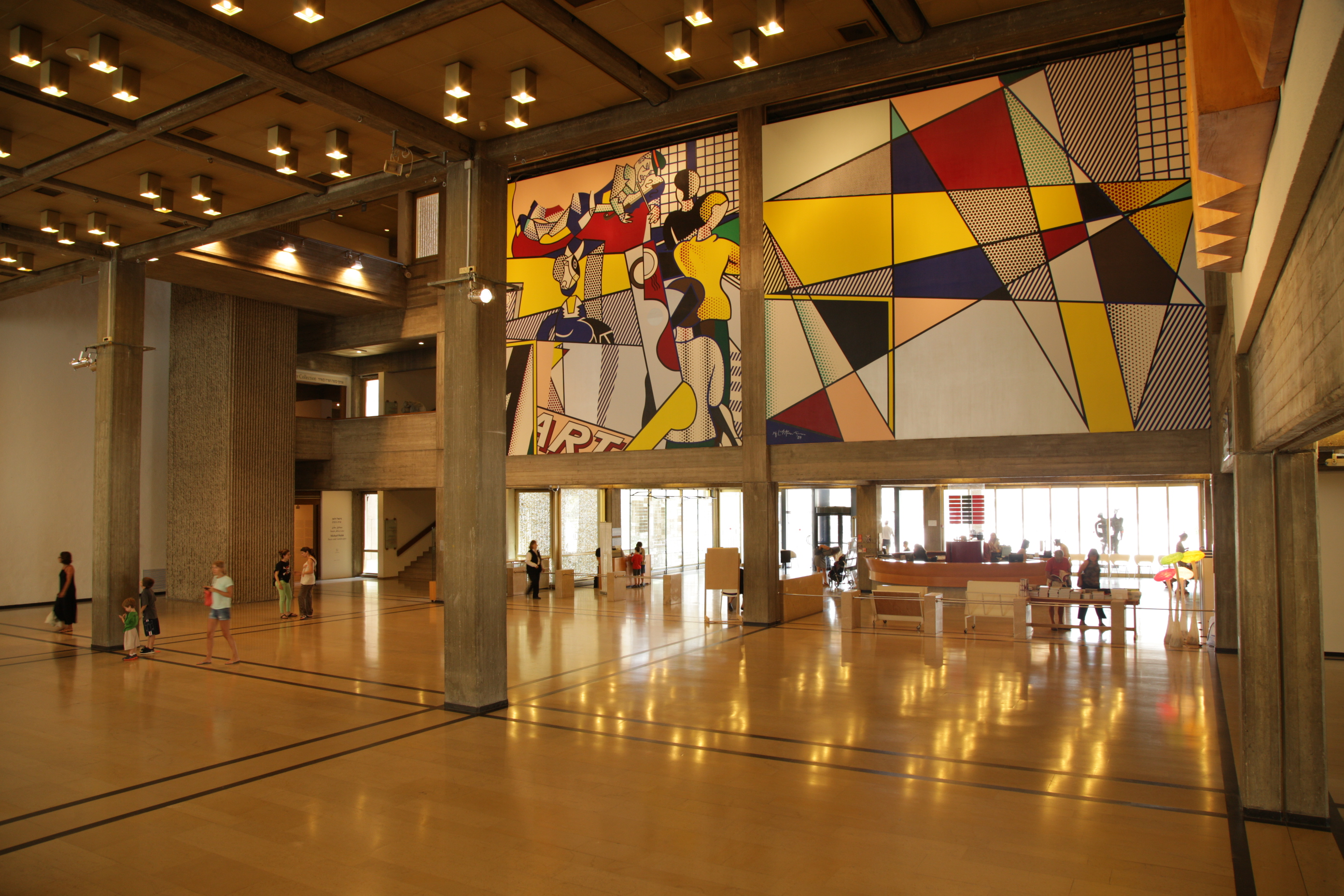 Le hall d'entrée intérieur du Museum of Art